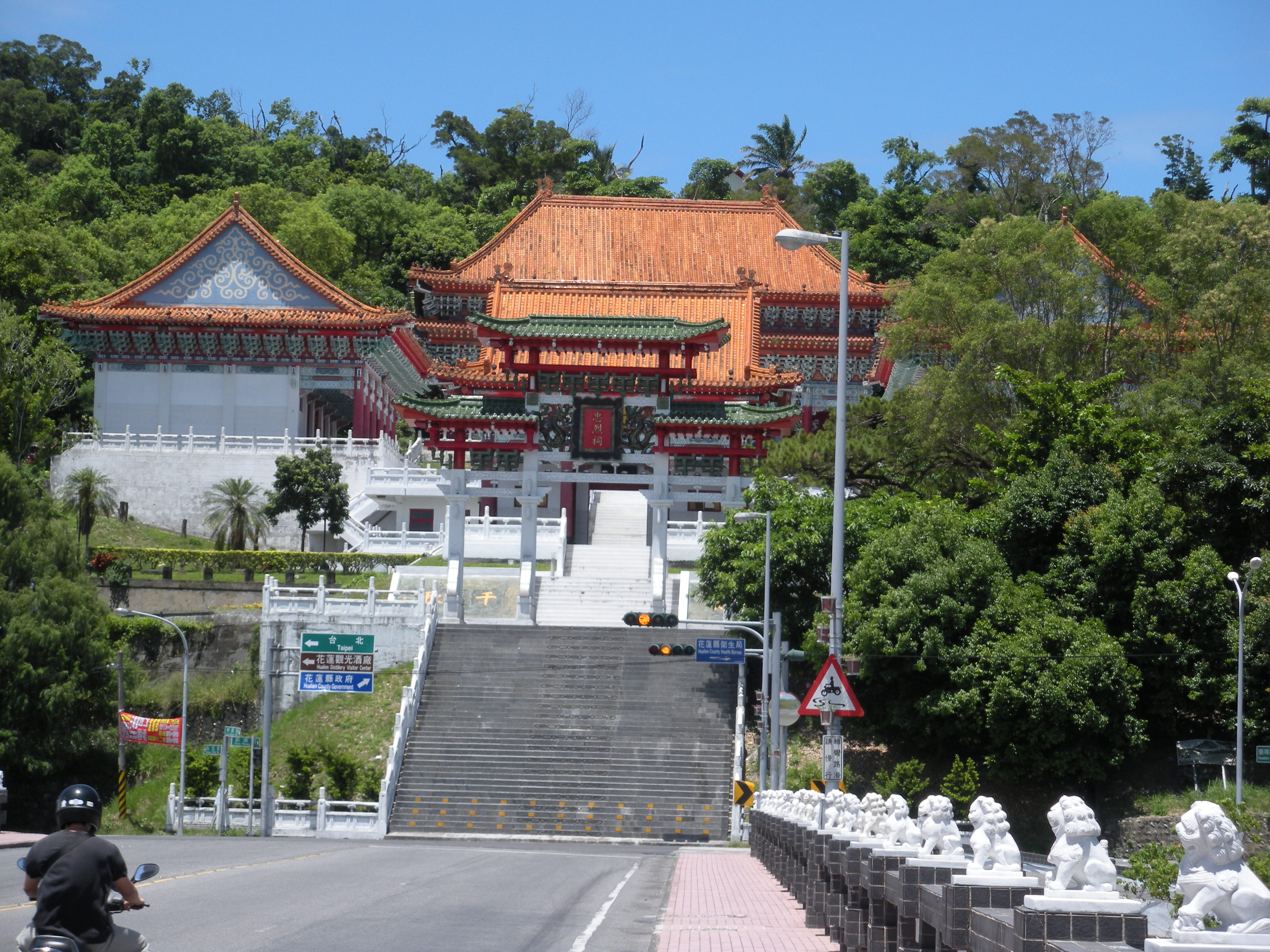 花蓮港神社の跡に建つ、花蓮忠烈祠